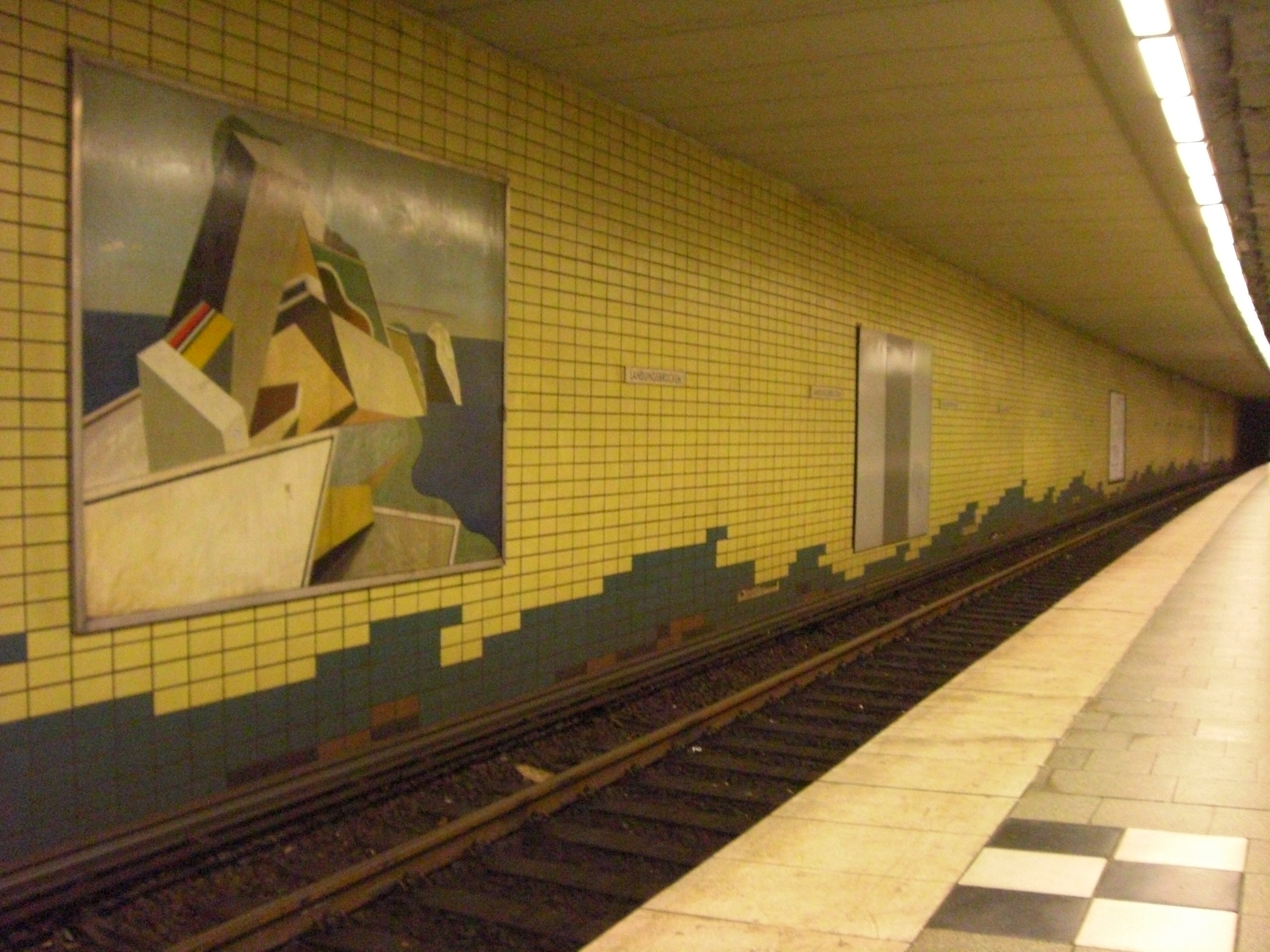 Bahnsteighinterwand der S-Bahnstation Landungsbrücken in Hamburg